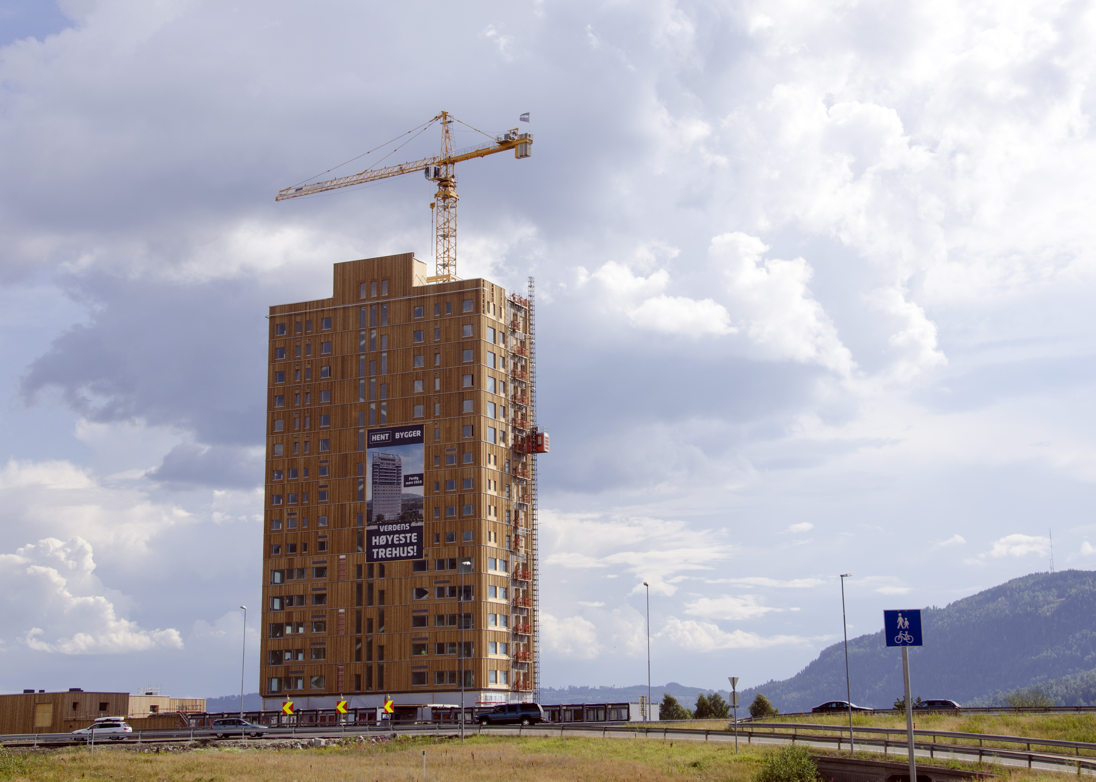 Mjøstårnet - Verdens høyeste trehus